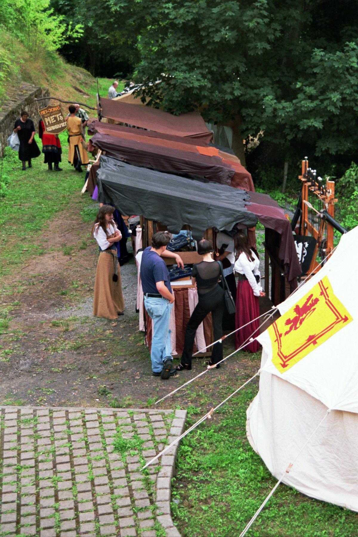 Medieval market on Falkenstein Castle